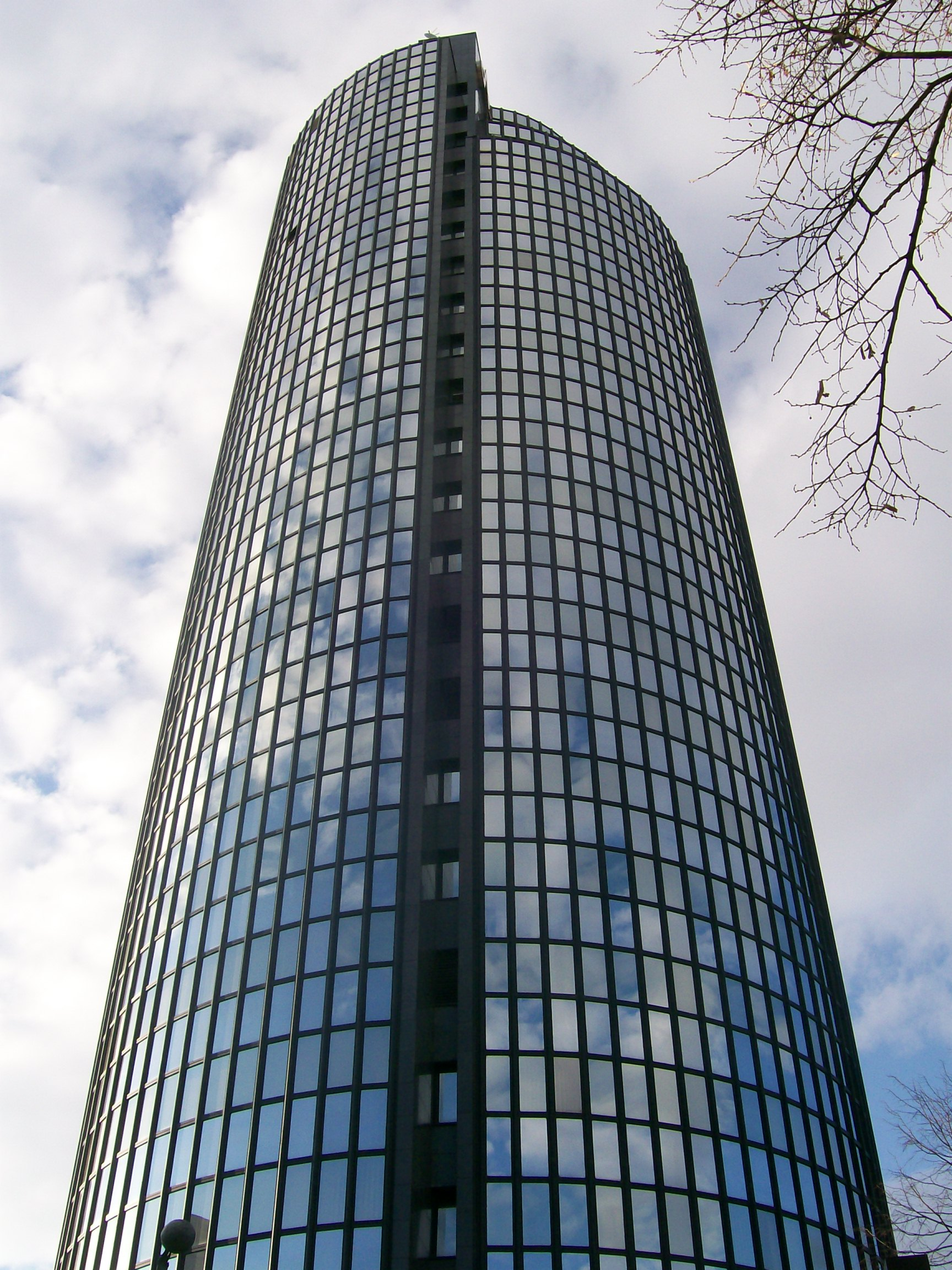 Cibonin toranj Zagreb